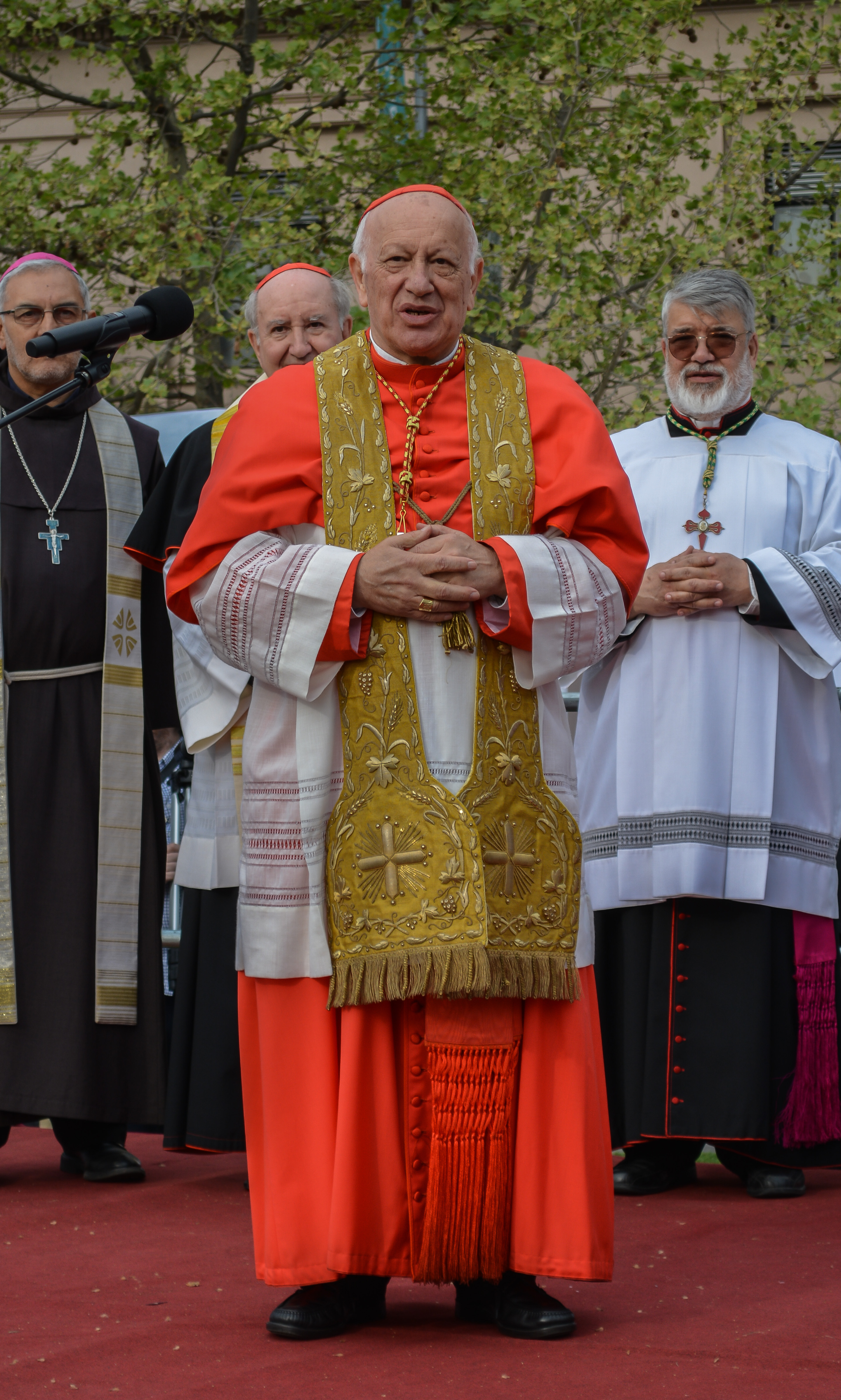 Ricardo Cardenal Ezzati Andrello. Procesión de la Virgen del Carmen 2017, Santiago, Chile